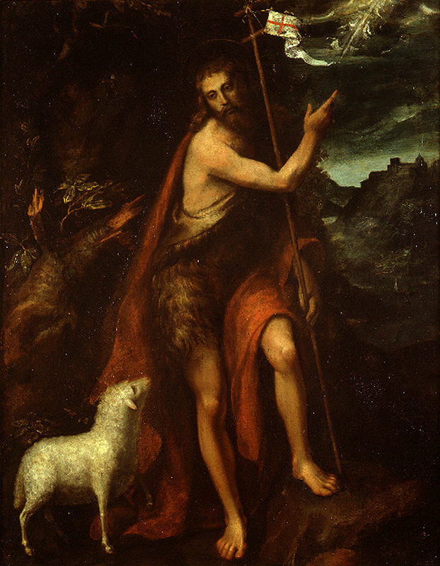 La obra representa al profeta y mártir San Juan Bautista, precursor del Mesías.